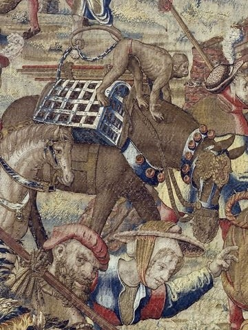 Arazzi Battaglia di Pavia - Scimmia su un mulo (particolare)